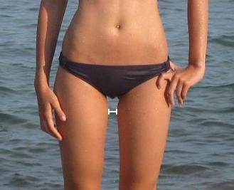 Thigh Gap bei einer Frau